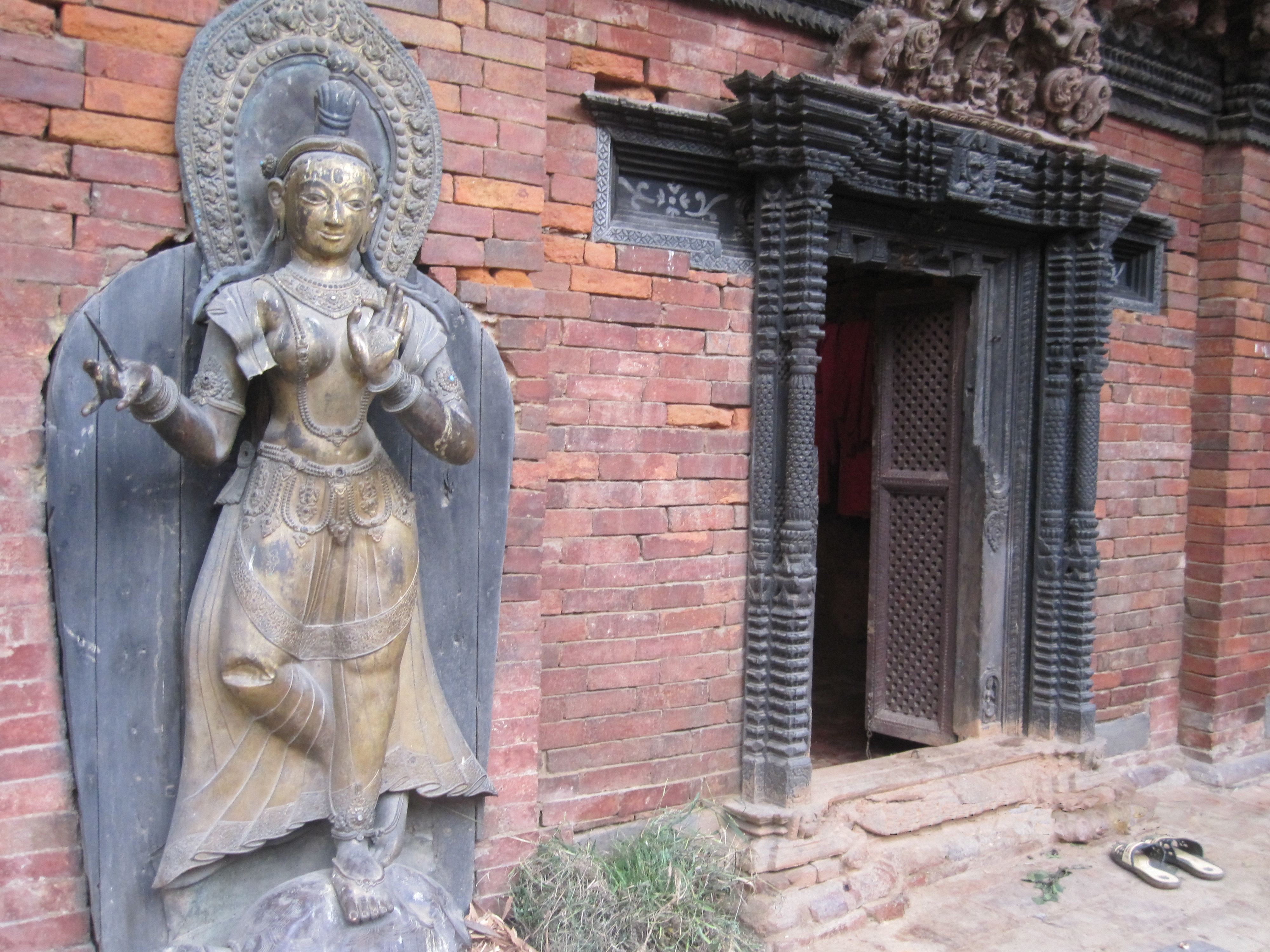 Patan, Kathmandu.